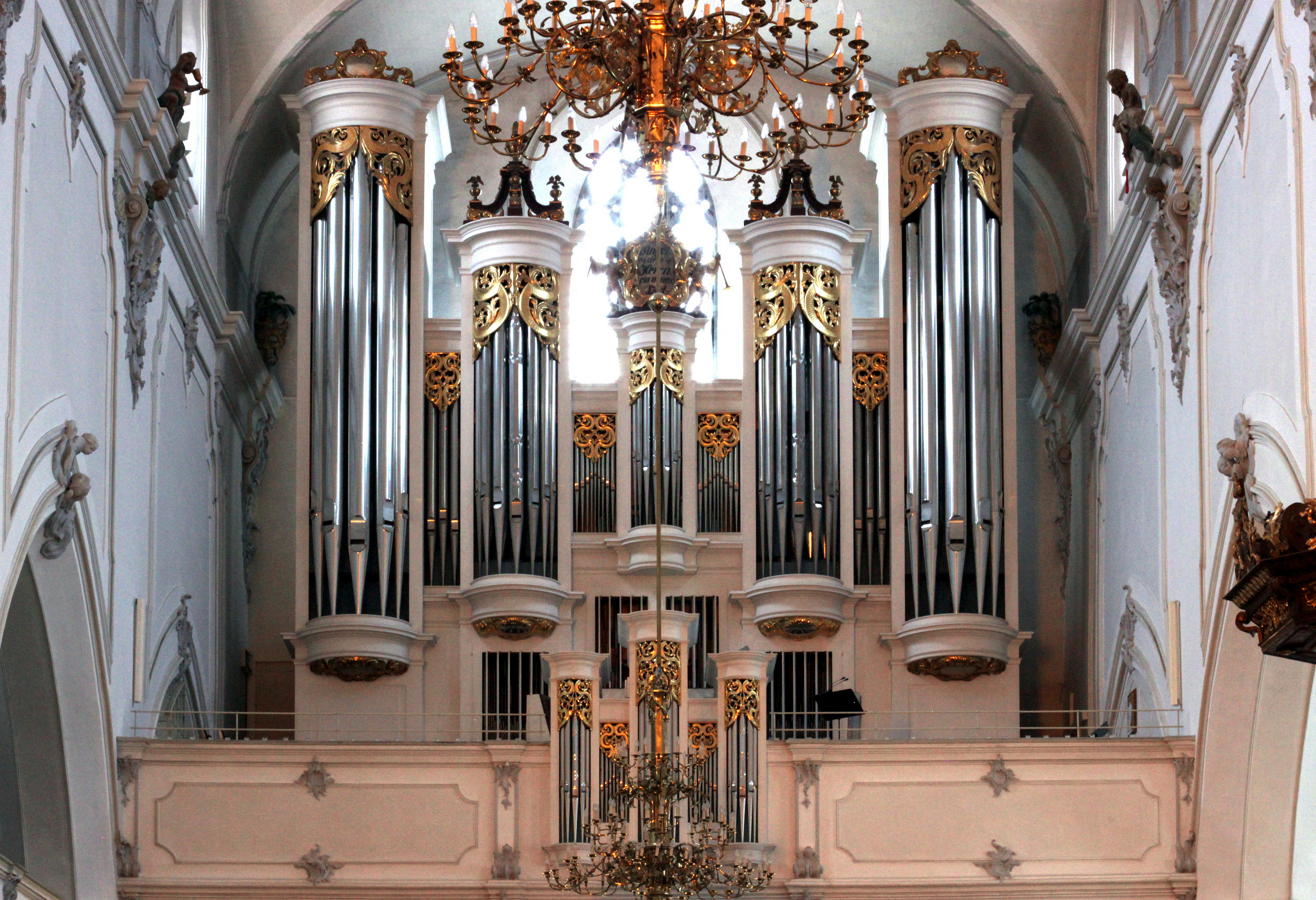 Orgel, St. Mang, Kempten